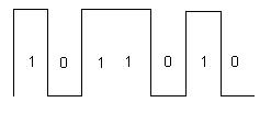 Binarni broj